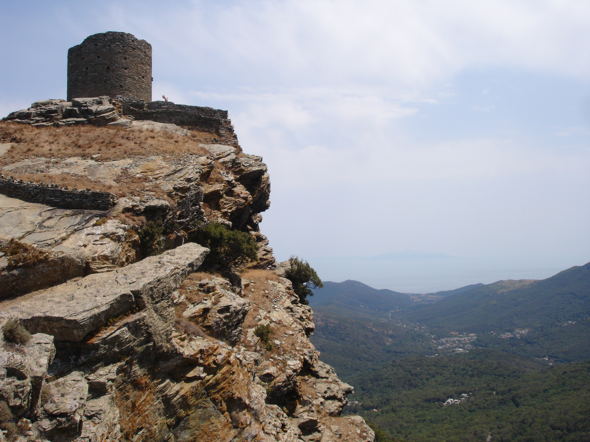 France, Haute-Corse (2B), Luri, Tour de Sénèque